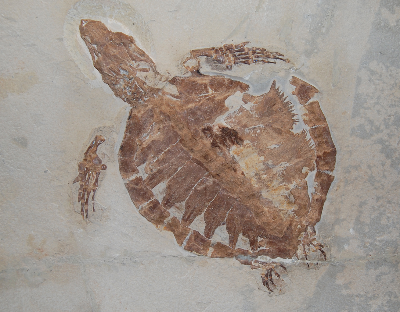 Museo civico di storia naturale Milano